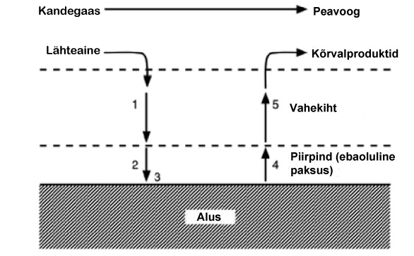 Ainevoogude liikumine CVD protsessis